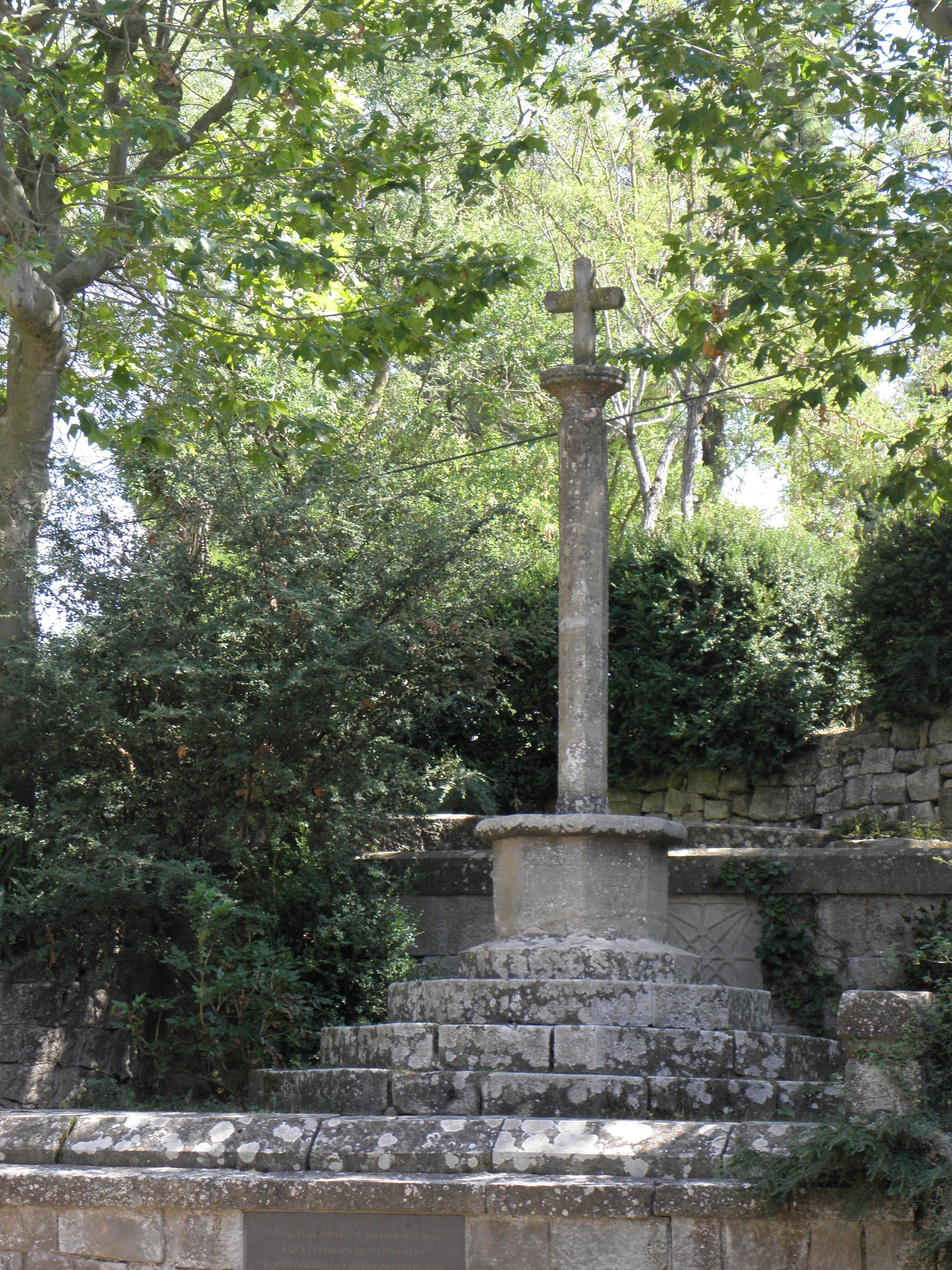 El Miracle (Riner, Solsonès). La creu commemmorativa de l'aparició, al costat dud de la plaça.